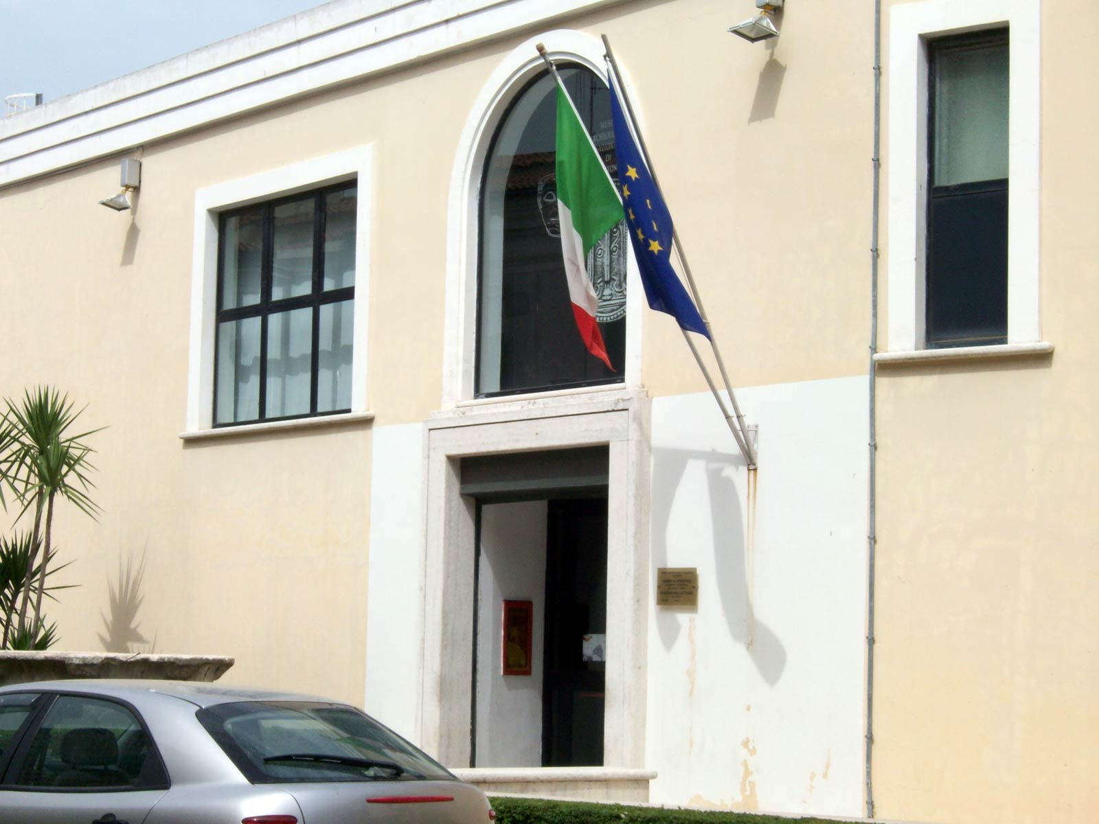 Il museo archeologico nazionale di Crotone, vista laterale